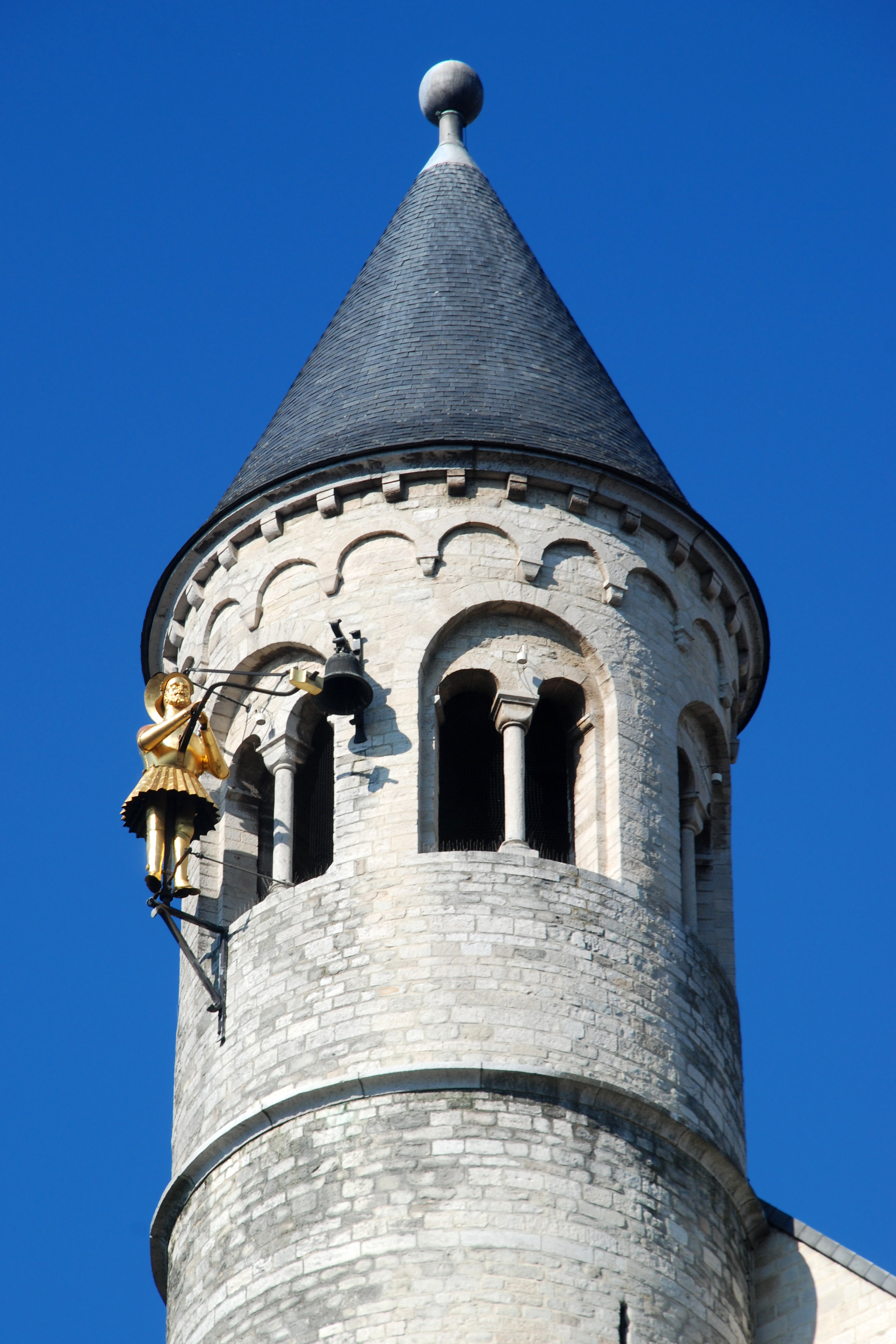 Belgique - Brabant wallon - Nivelles - Collégiale Sainte-Gertrude